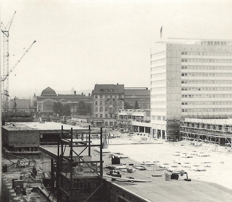 Aufnahme der im Bau befindlichen Prager Straße in Dresden (März 1968). Der letzte Altbau der früheren Bebauung, das Hotel Excelsior, steht noch und wird wenige Wochen später gesprengt. Der fertige Neubau rechts ist das Hotel Bastei.